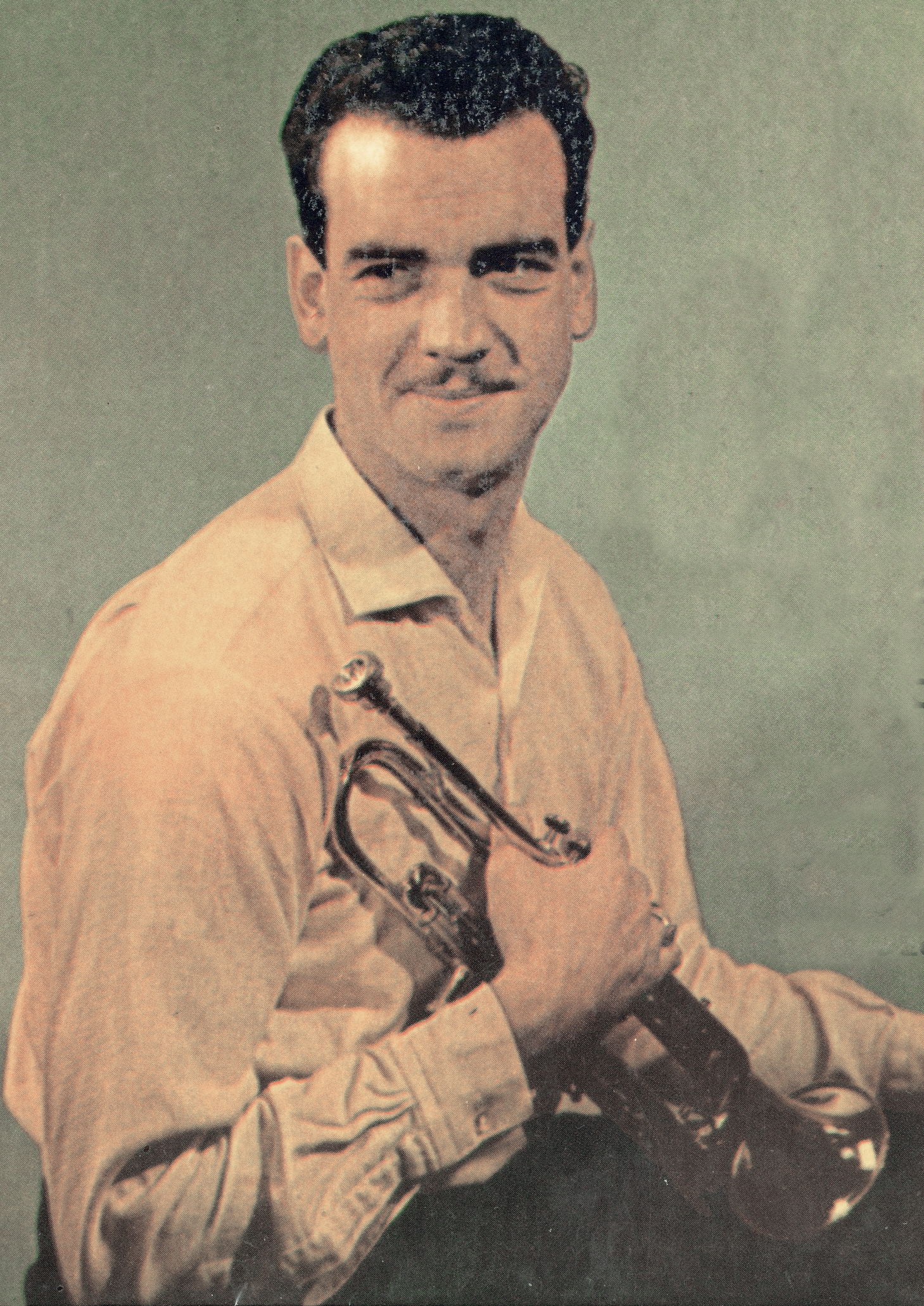 Arne Lamberth